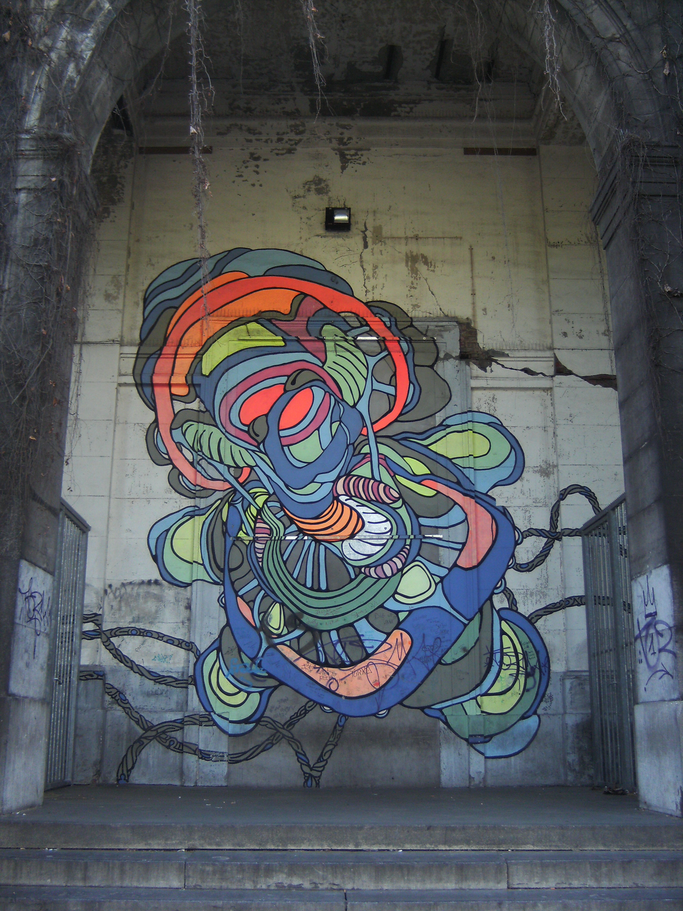 Charleroi (Belgique), dessiné par Gabriel Devreux (1886-1917) comme Palais de l'Art wallon pour l'exposition de Charleroi de 1911. Détail du portique. Le bâtiment héberge depuis 2000 le B.P.S.22, musée et espace de création contemporaine de la Province de Hainaut.